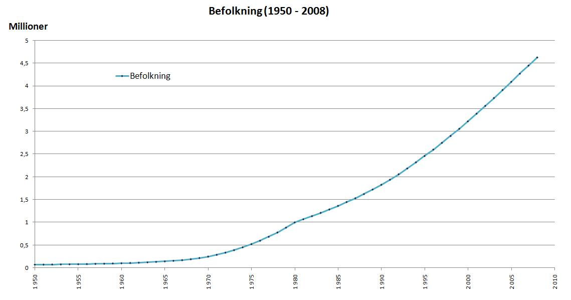 De Forente Arabiske Emiraters befolkningsvekst 1950-2008